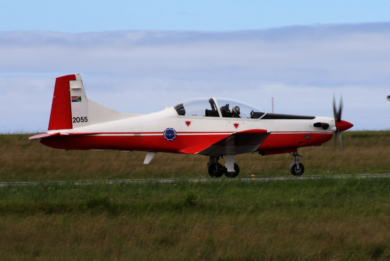 SAAF PC-7 MkII 2055